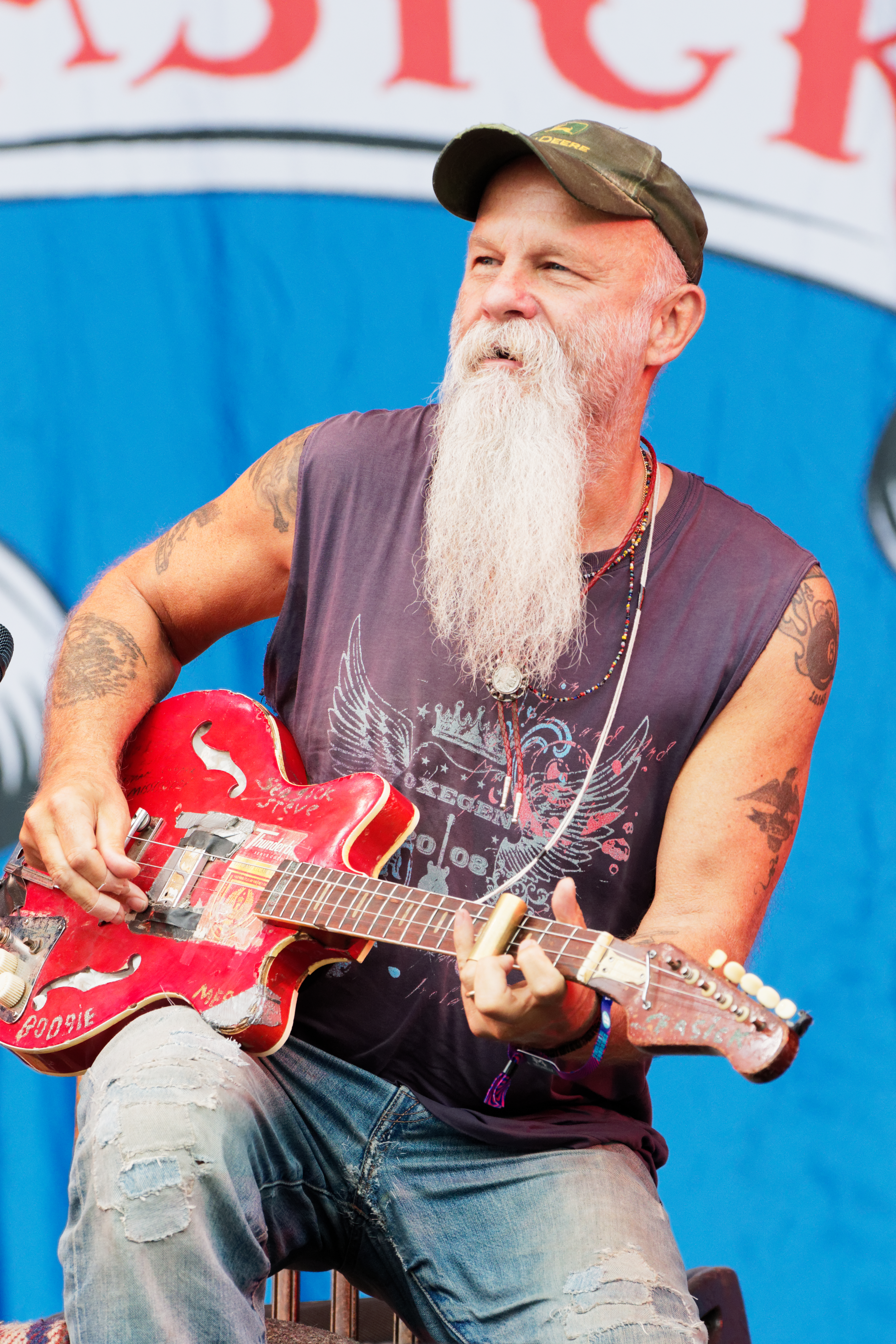 Seasick Steve en concert lors du festival des vieilles charrues 2017.